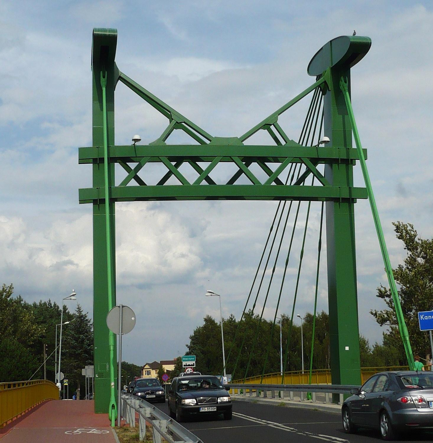 Dźwirzyno, most na kanale